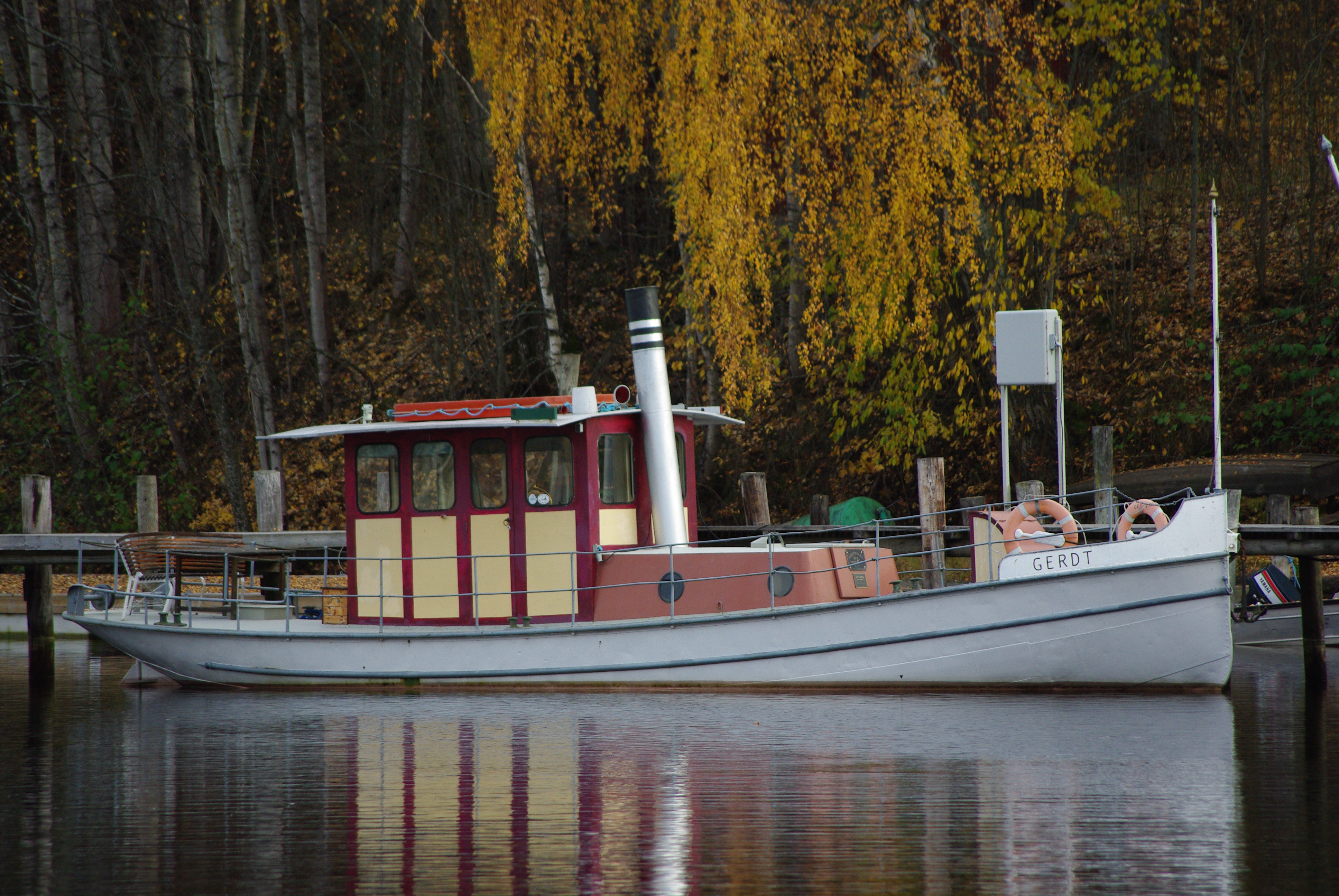 Varpbåten Gerdt vid sin kajplats i Leksand. This is an image of a protected Swedish ship, with call sign SFC 5110 .